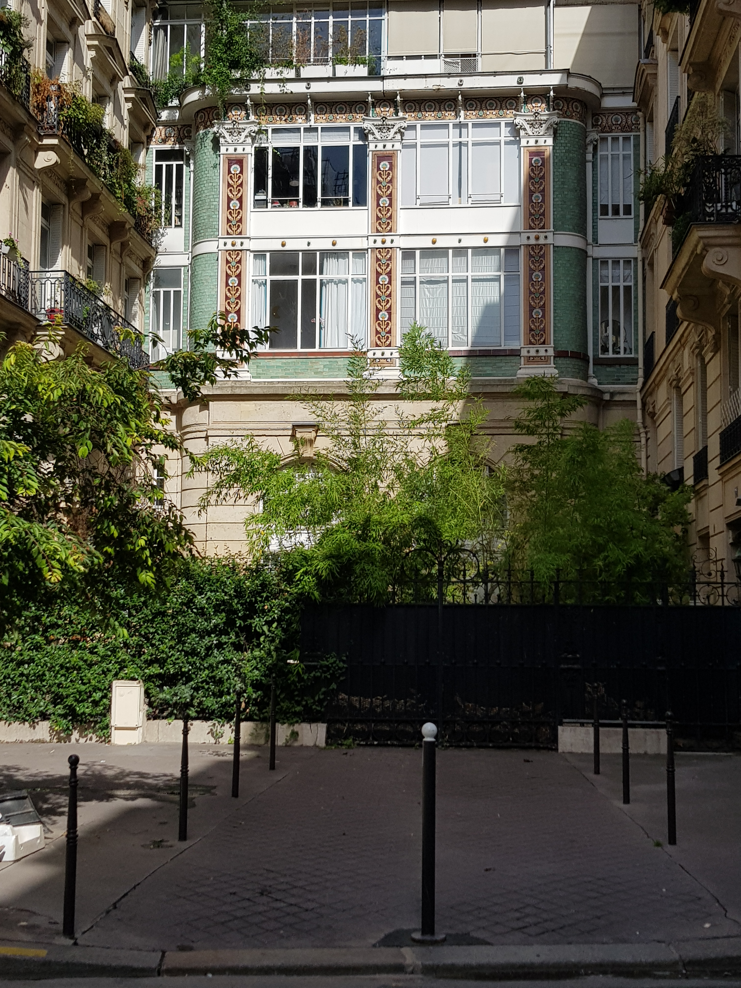 7-9, rue Edouard-Detaille, Paris 17e.